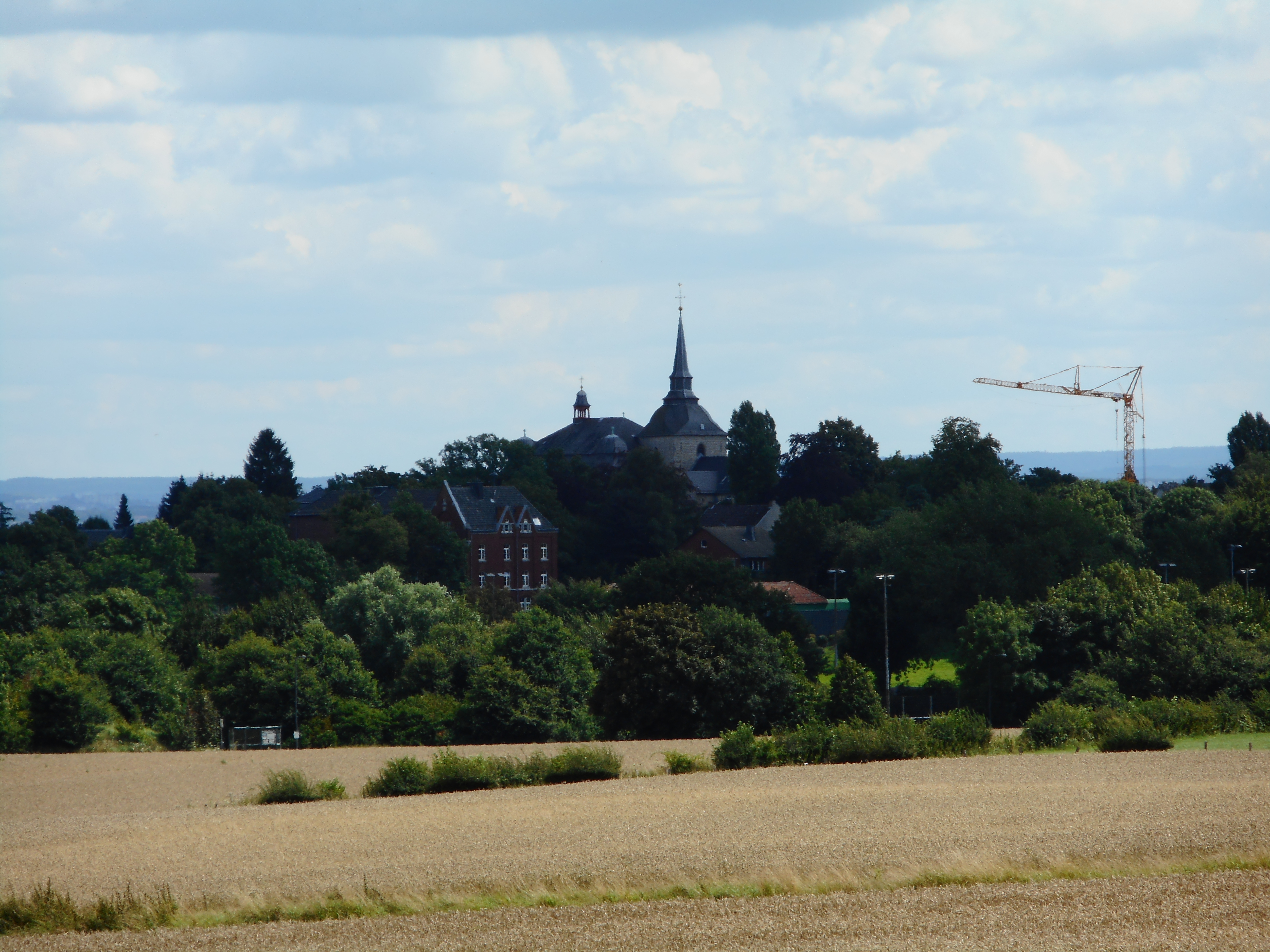 Blick von Vetschauer Berg auf die Kirche St. Laurentius in Laurensberg (Aachen)